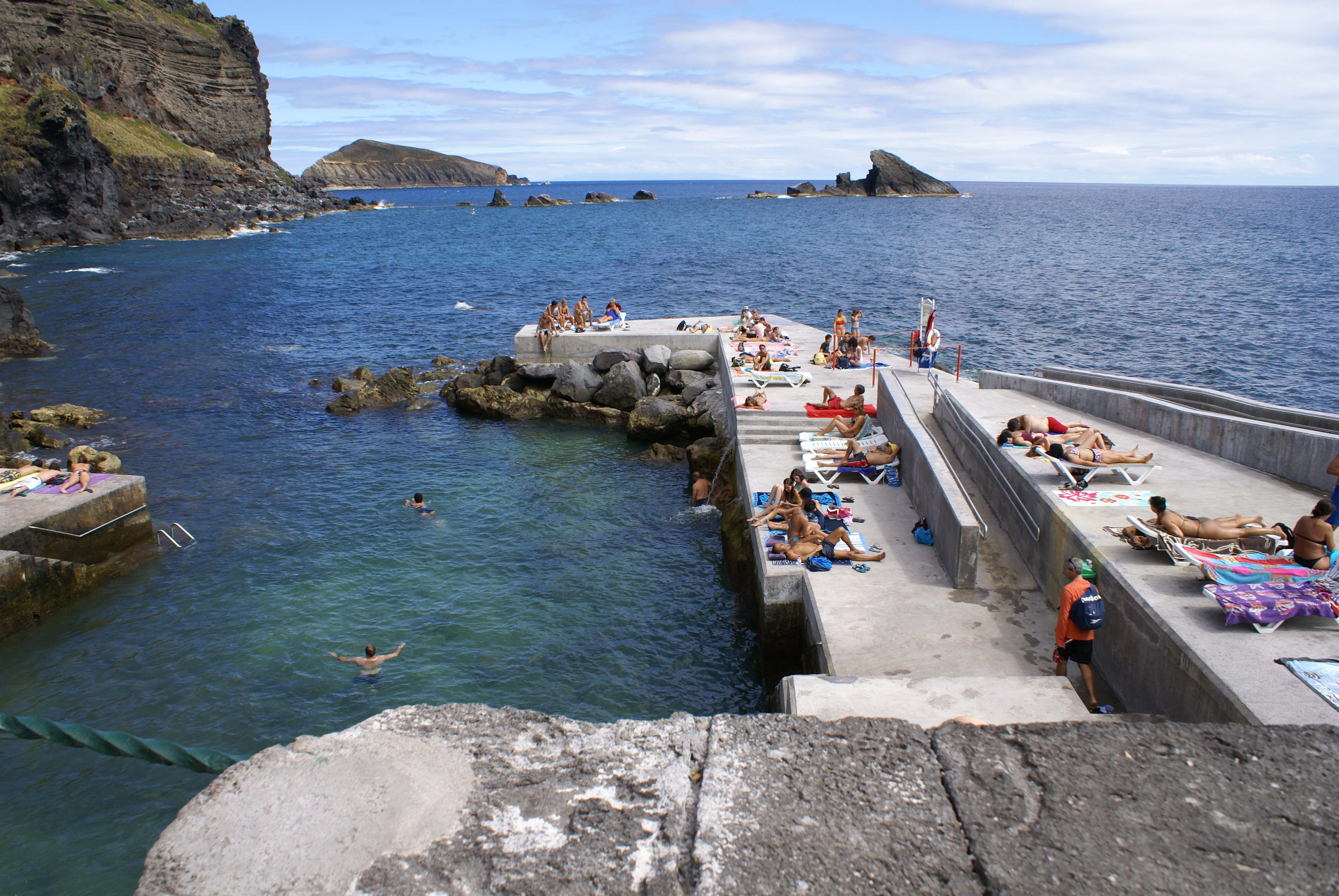 Porto do Carapacho, carapacho, Santa Cruz da Graciosa, ilha Graciosa, Açores, Portugal